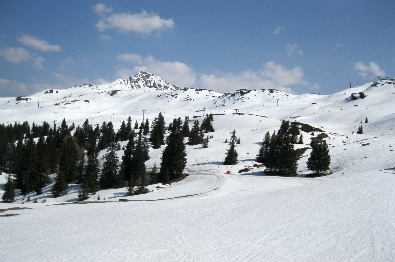 Skigebiet Ratschings-Jaufen im Bereich Enzianlift - Wasserfalleralm